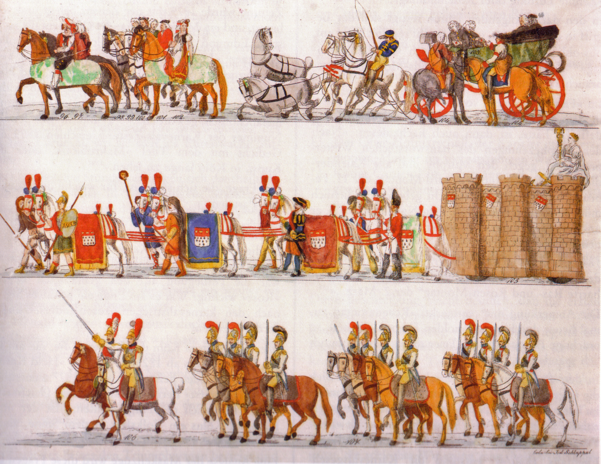 Maskenzug 1825 (1), einer der ersten Kölner Karnevalsumzüge; Blatt 7/7 - 36,6 x 45,7 cm